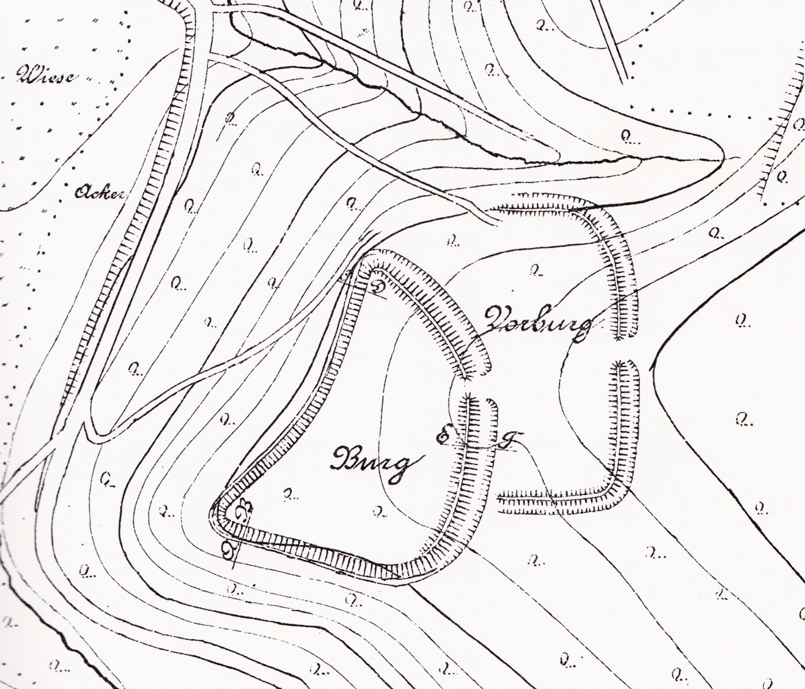 Lageplan der Uffoburg auf dem Rintelnschen Hagen von 1916 (nach Carl Schuchhardt 1859-1943)